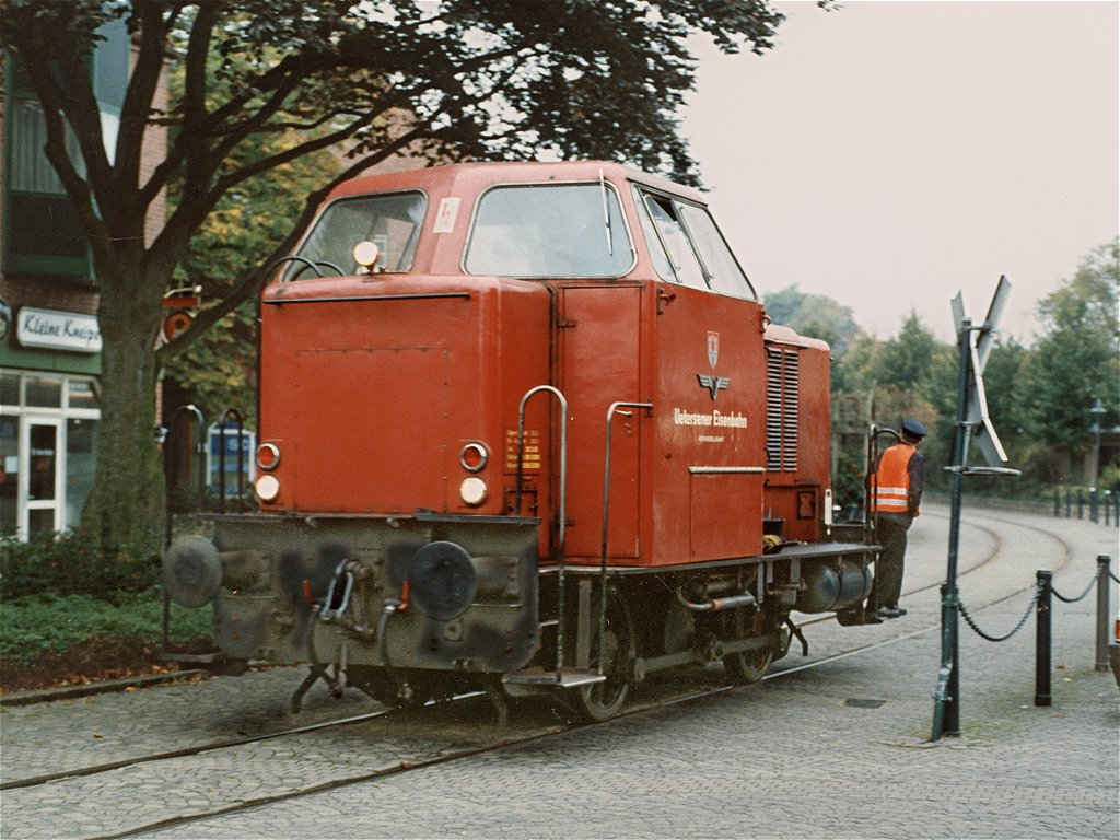 Uetersener Eisenbahn 1997, Tornesch Uetersen-Railroad, Tornesch, Germany 1997